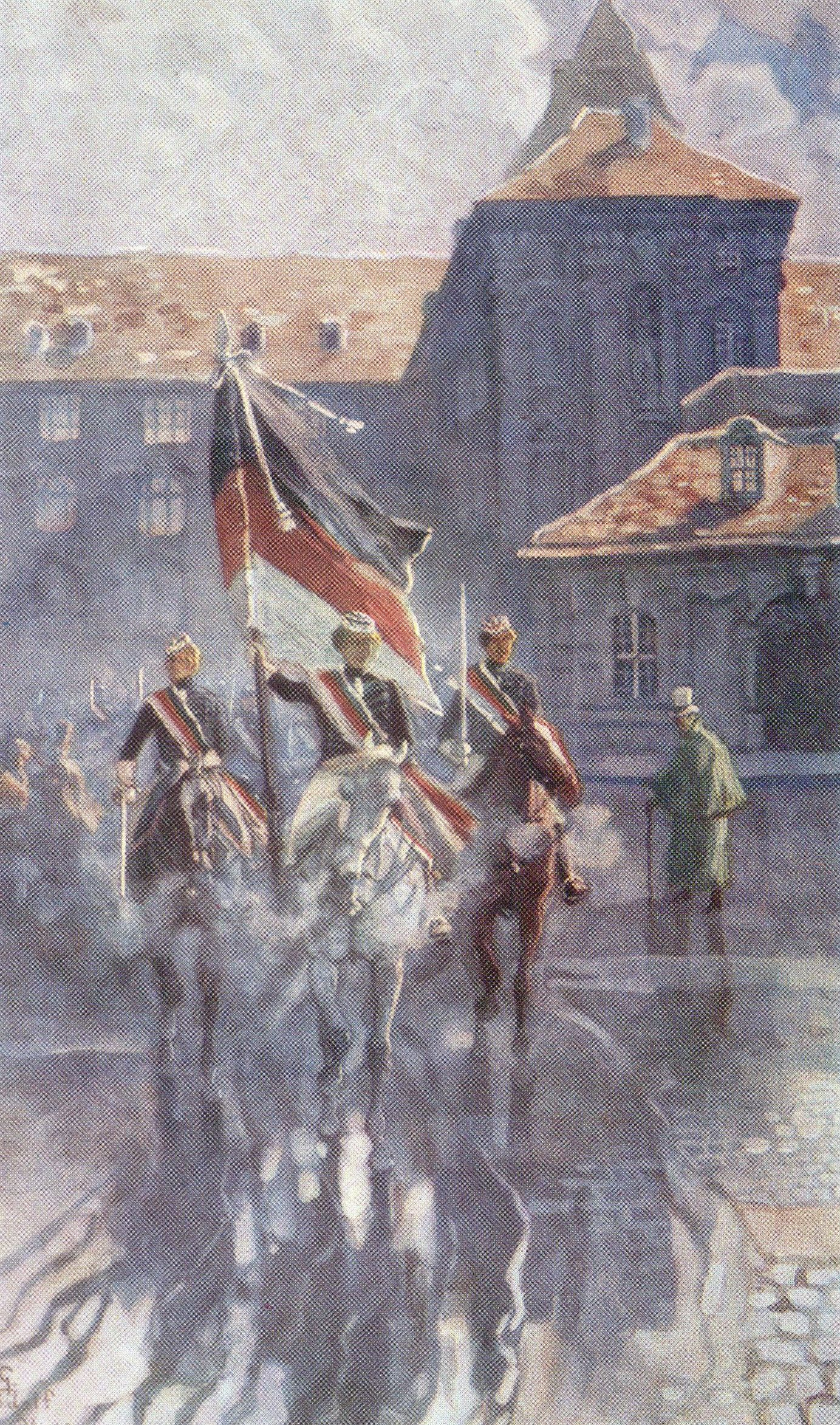 Breslauer Preußen reiten durch das Kaisertor der Universität Breslau